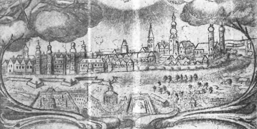 Oberglogau im Jahre 1636